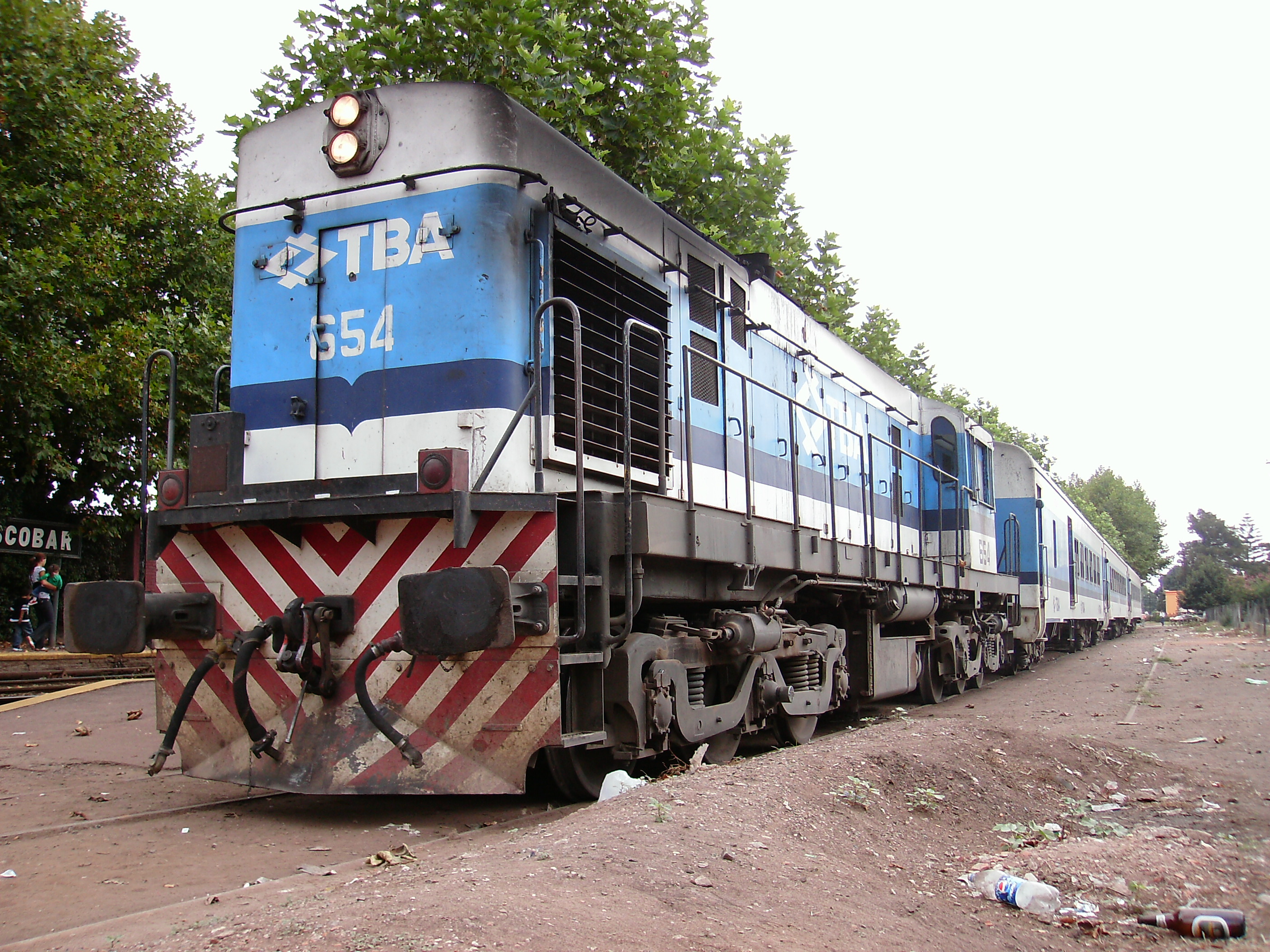 Alco RSD-39 (especificación DL535).